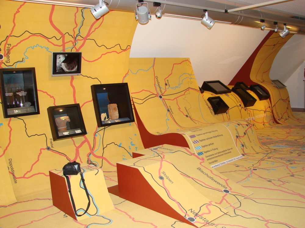 Ausstellungsraum im Archiv